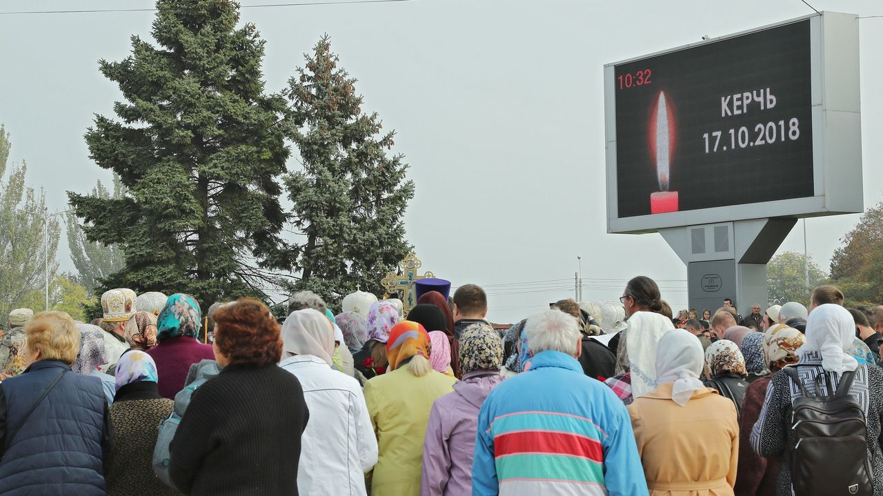 Церемония состоялась на площади Ленина в Керчи